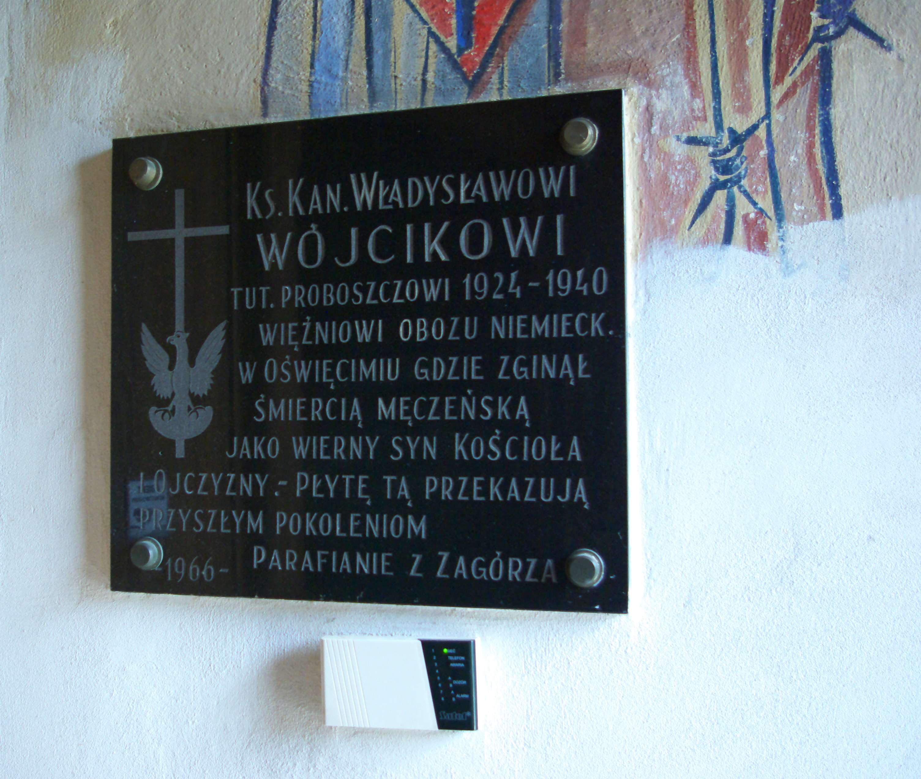 Tablica pamiątkowa w kościele Wniebowzięcia Najświętszej Maryi Panny w Zagórzu - upamiętnia ks. proboszcza Władysława Wójcika